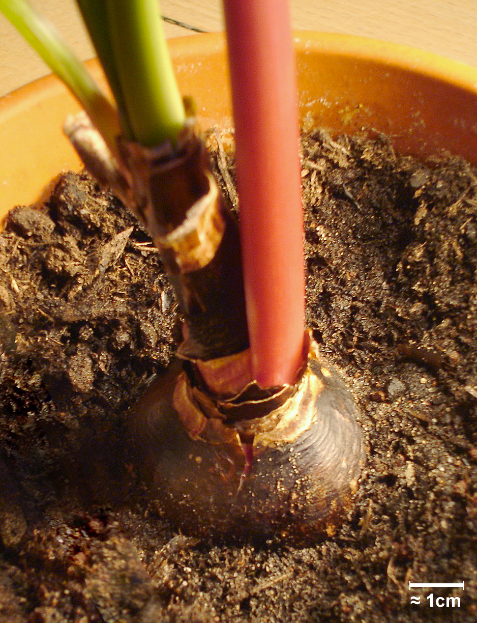 Sprekelia formosissima, bulb